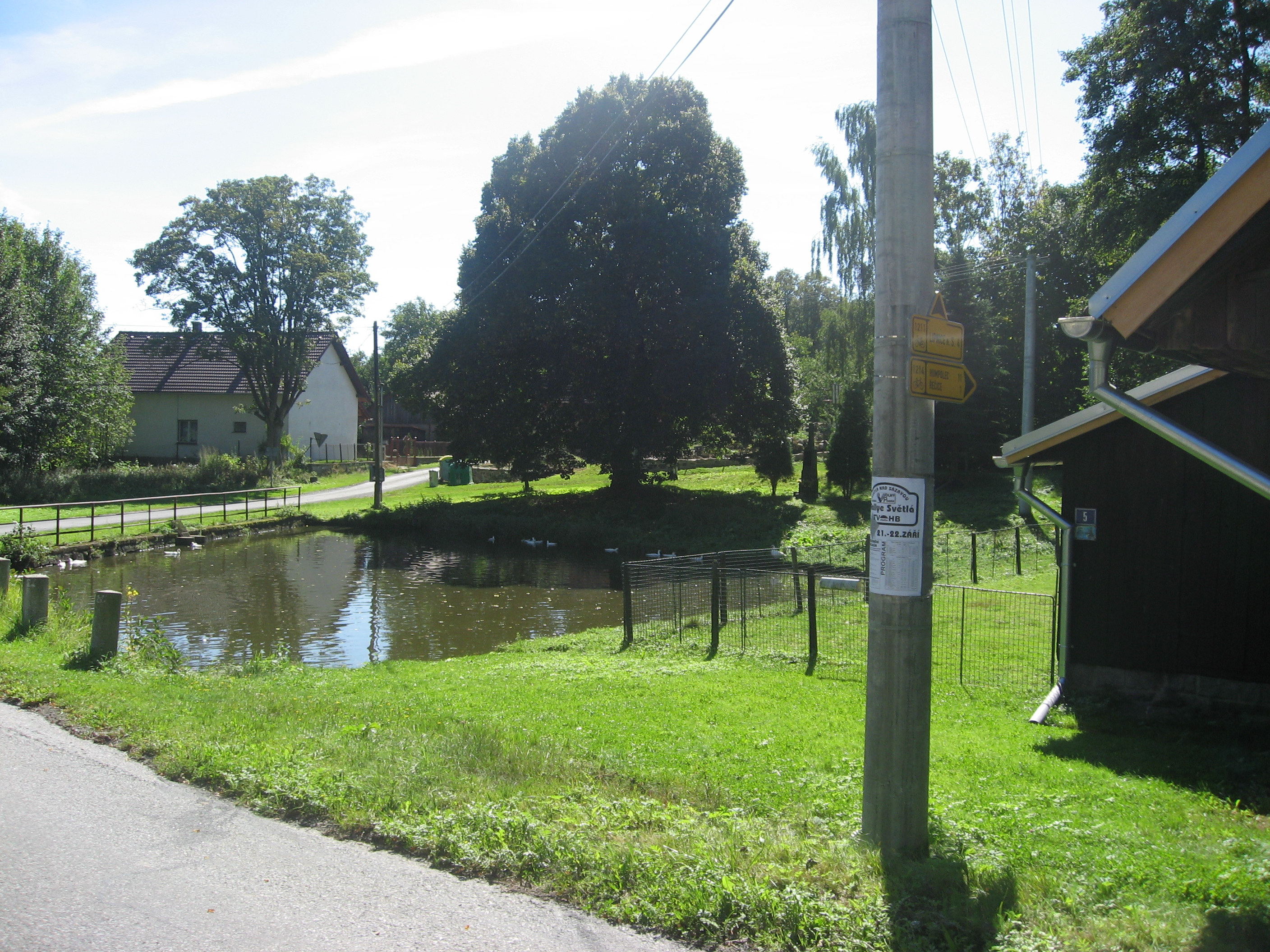 Bystrá, část obce Řečice